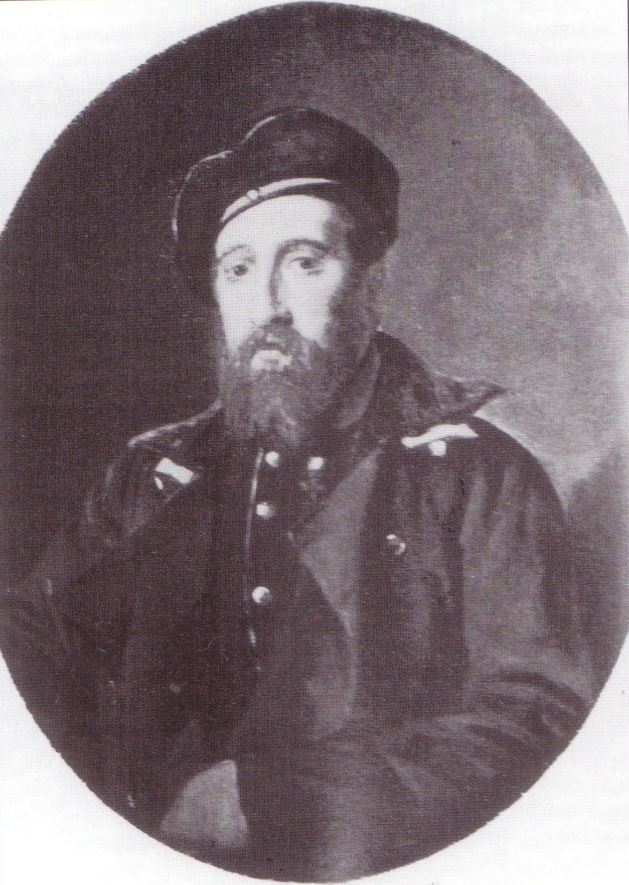 Porträt von Graf Adelbert von Baudissin (1820-1871)